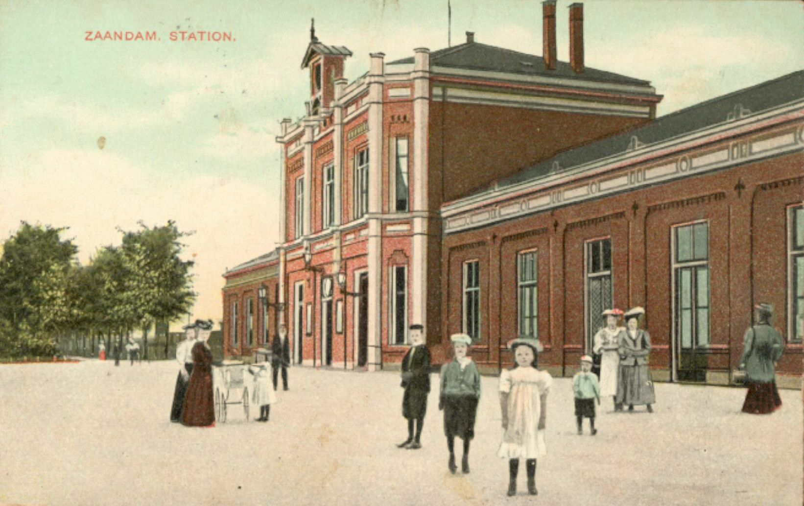 Gezicht op het H.S.M.-station Zaandam te Zaandam.